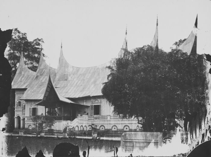 foto. Een Europees stenen huis in de bouwstijl van de Minangkabau met een dak van golfplaat en met een stenen bank in de tuin